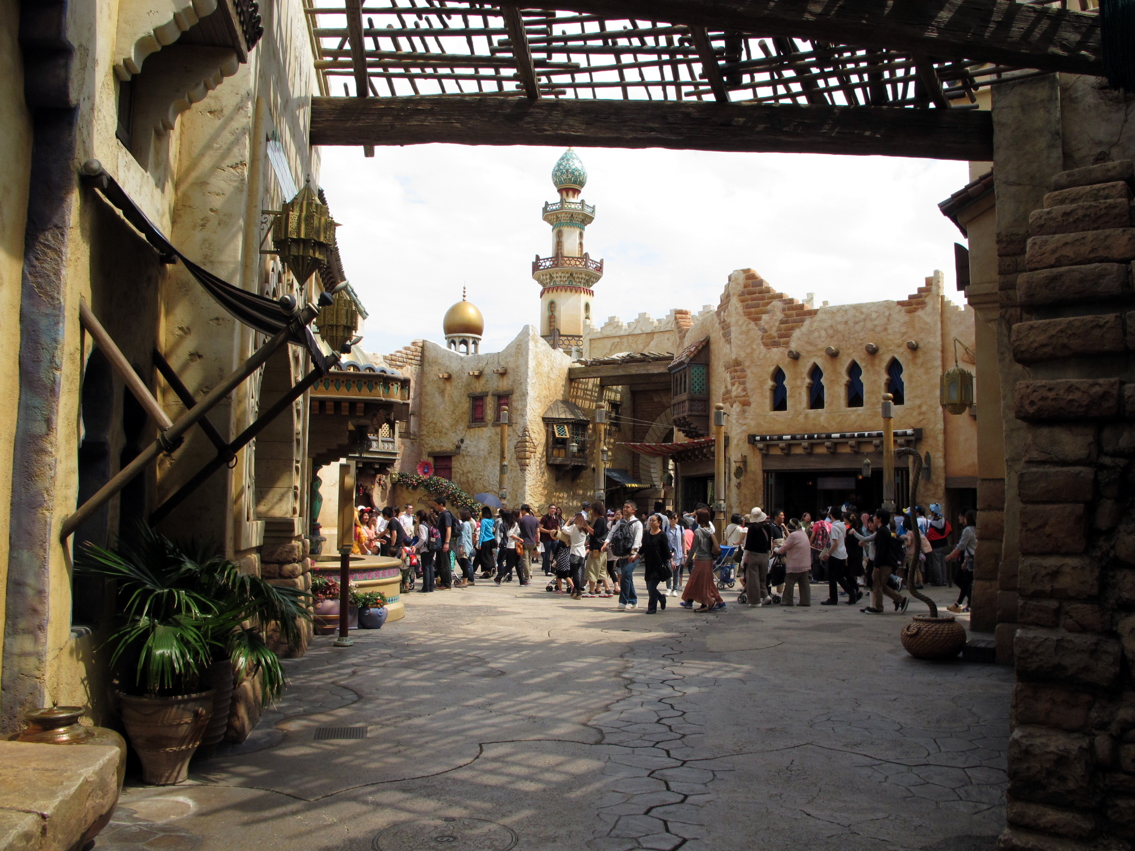 Tokyo DisneySea Arabian Coast